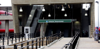 Entrada da nova estação Tamanduateí.